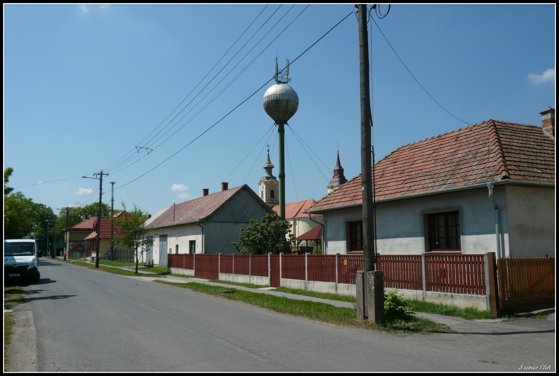 Báránd, Hungary